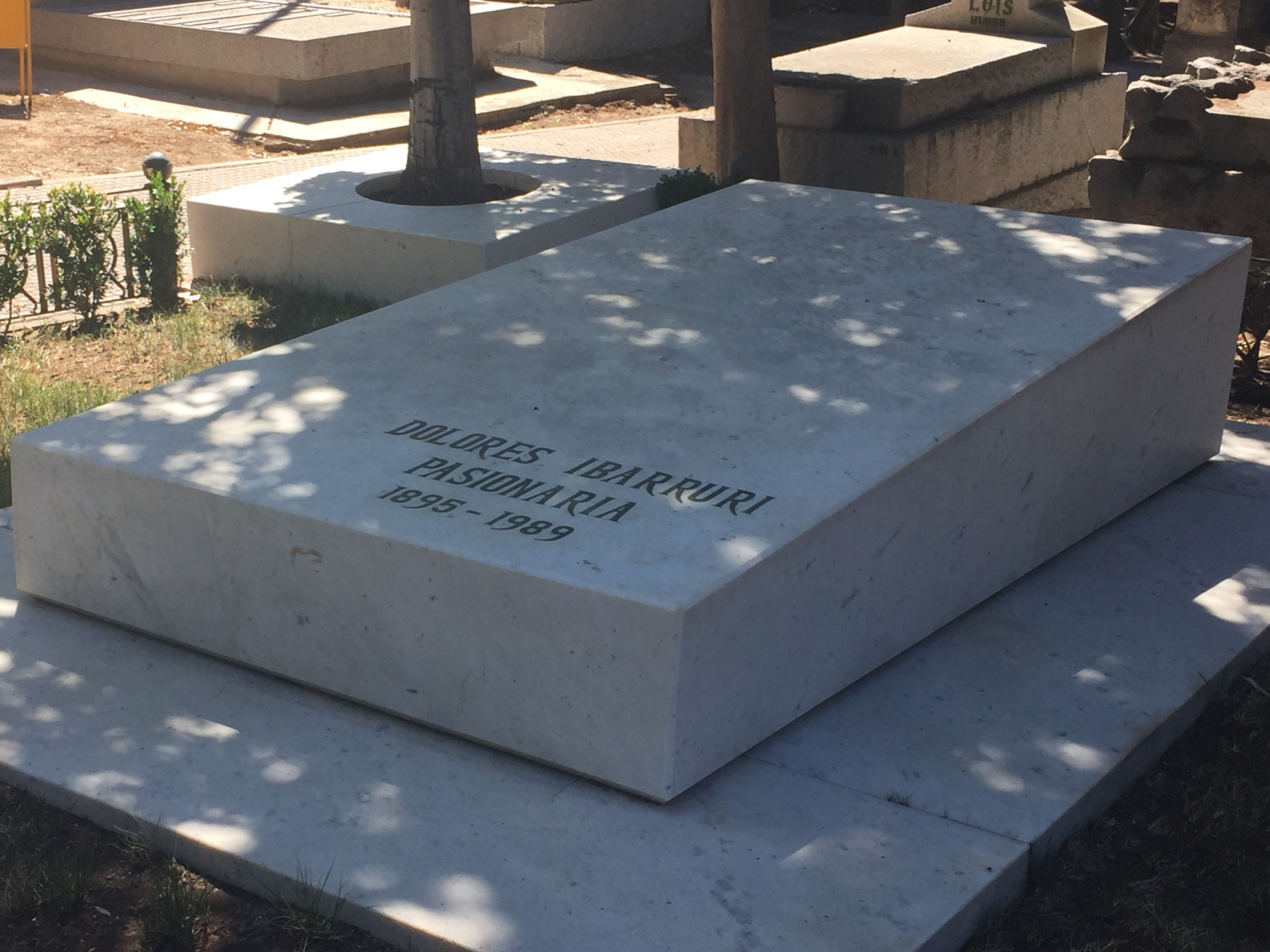 Claddwyd Dolores Ibarruri'n mynwent La Almudena'n Madrid. ae'r bedd i'w weld ar y chwith yn agos i fynedfa'r fynwent.